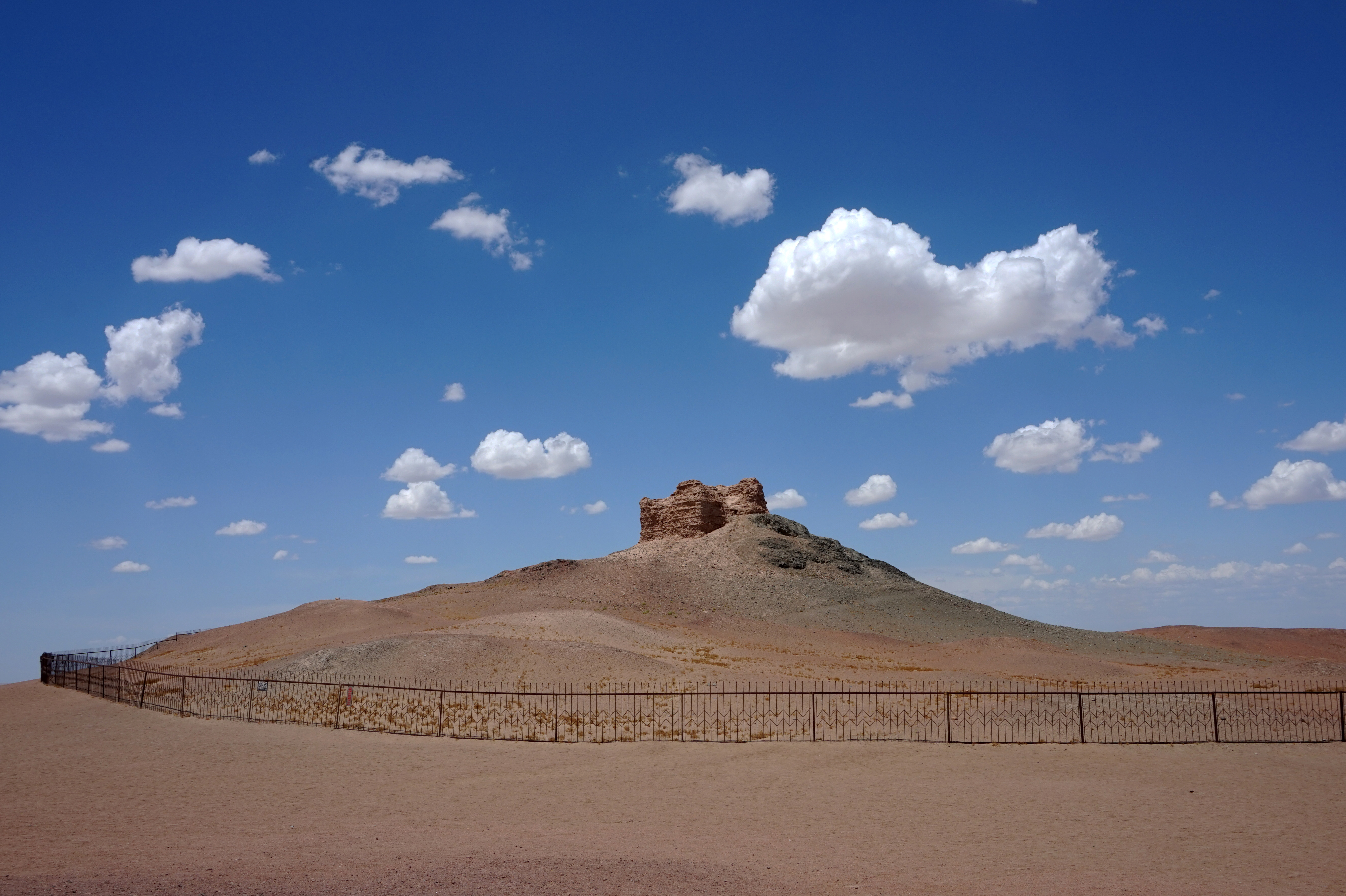 敦煌阳关烽燧遗址。